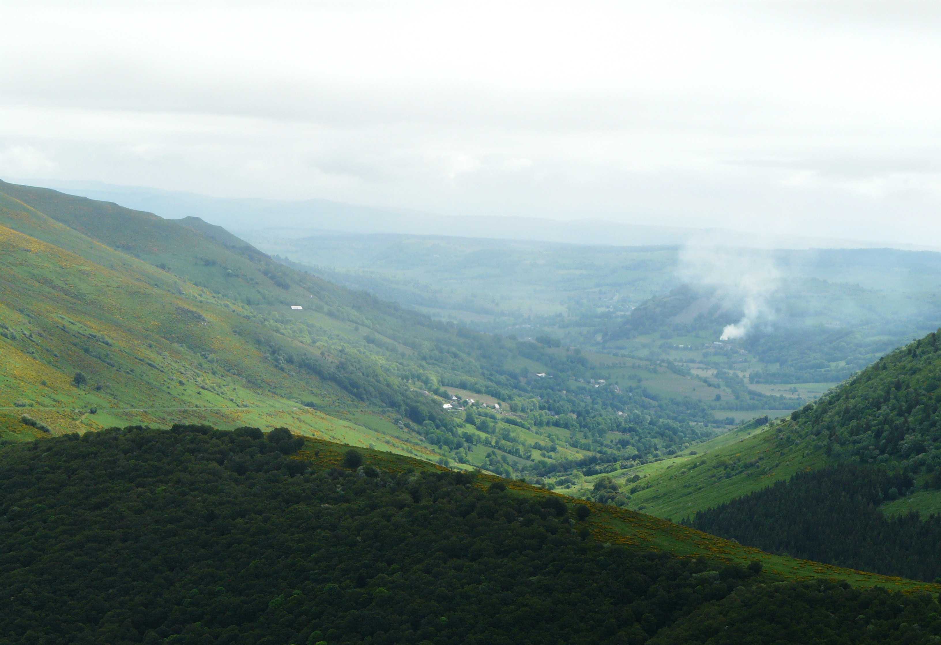 La haute vallée de l'Impradine prolongée par la vallée de la Santoire, vues depuis le pas de Peyrol, Cantal, France.